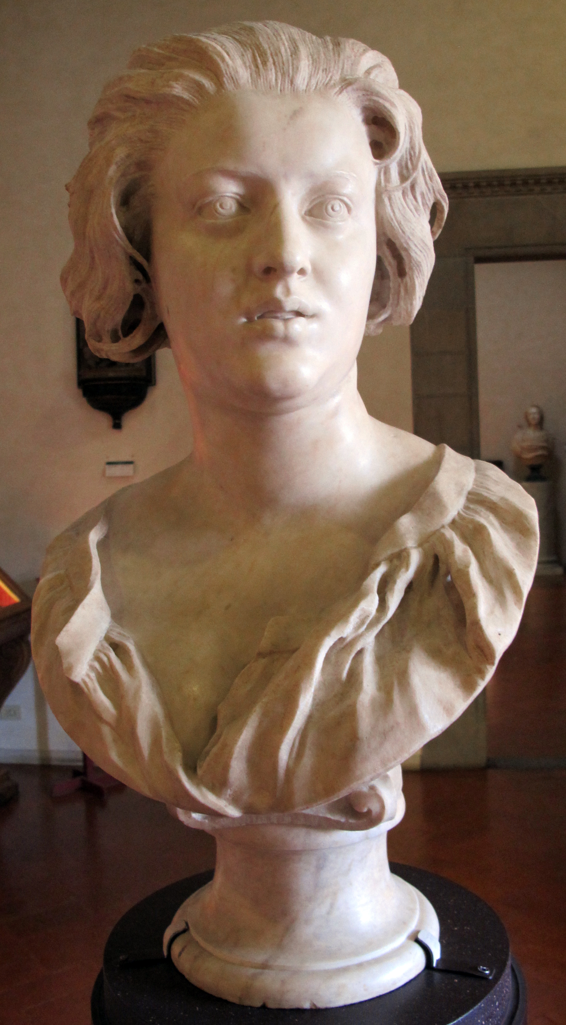 Gianlorenzo bernini, ritratto di costanza bonarelli, 1637-38